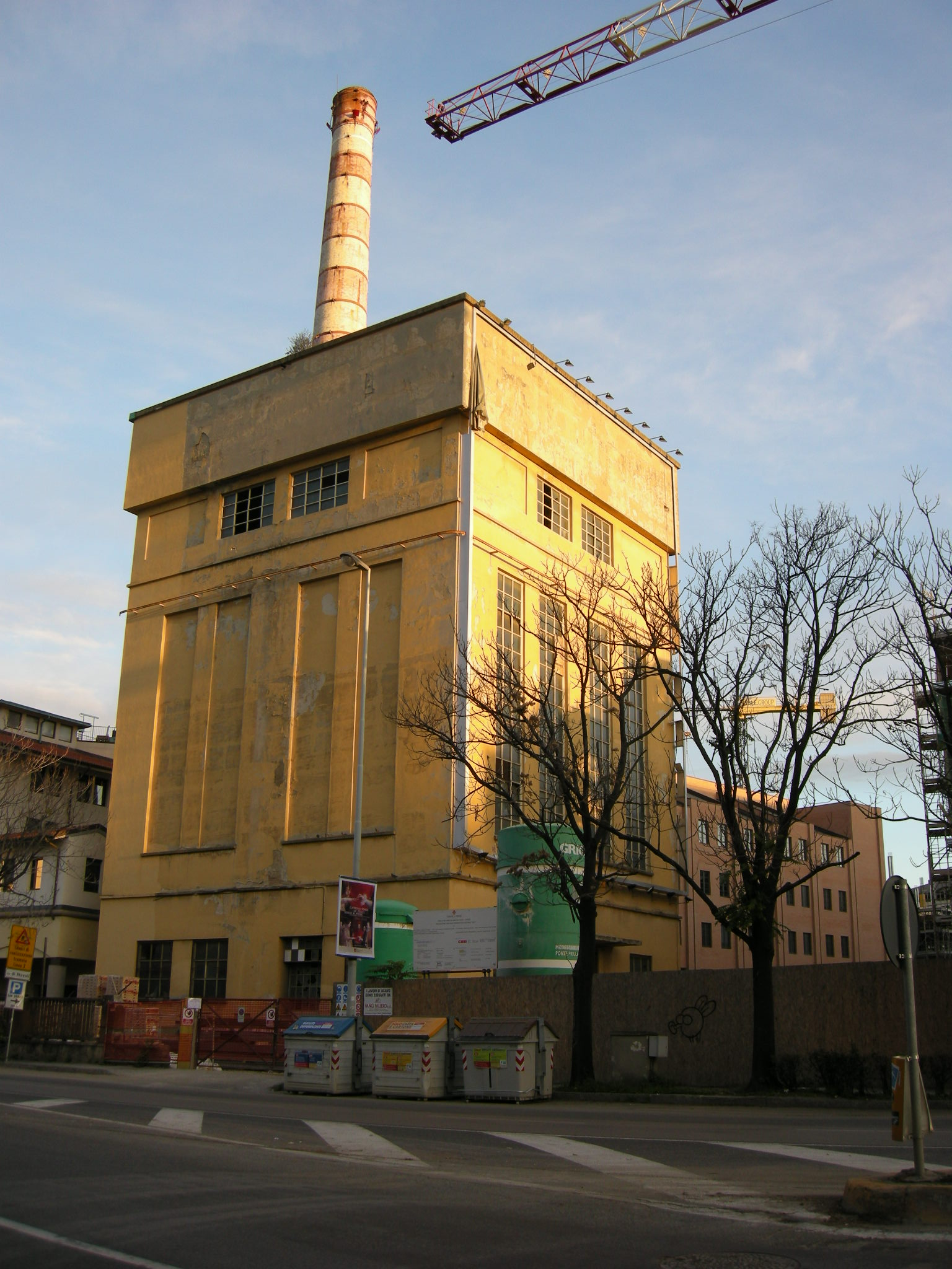 Ex stabilimento fiat di novoli